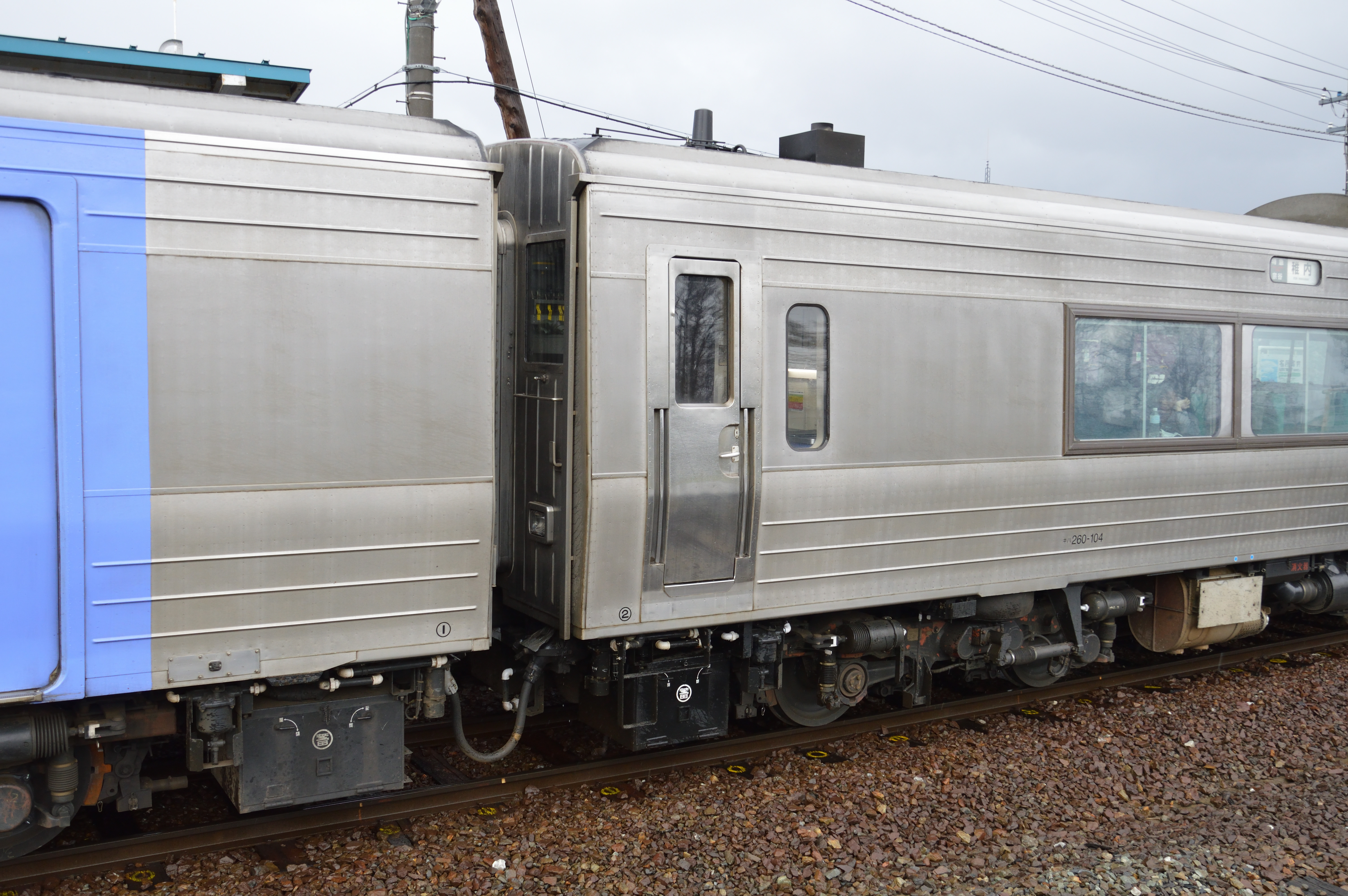 キハ260-102（写真左）の簡易運転台外観。